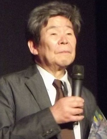 Isao Takahata au Festival international du film d'animation d'Annecy 2014